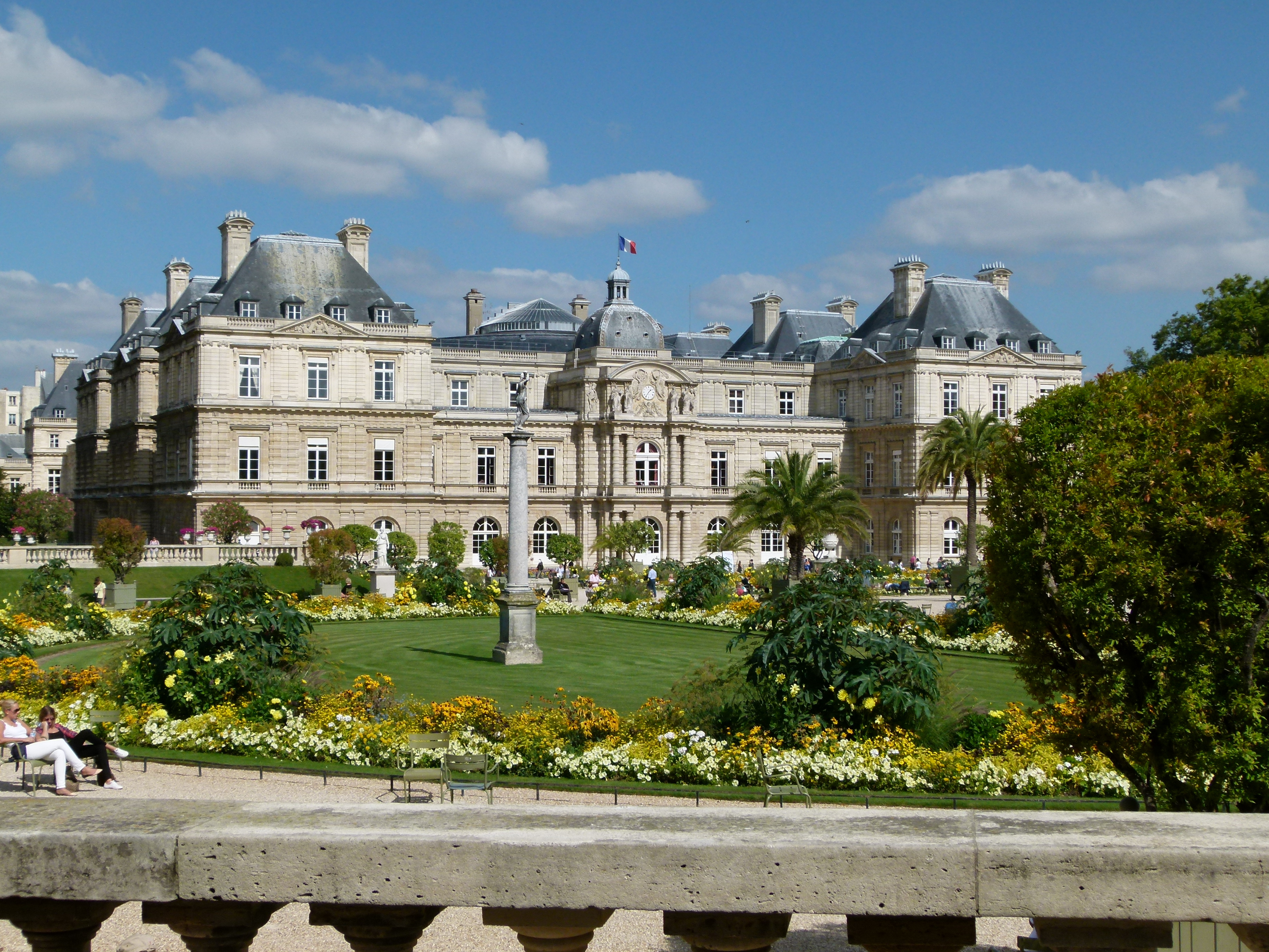 Jardin du Luxembourg - Le Sénat